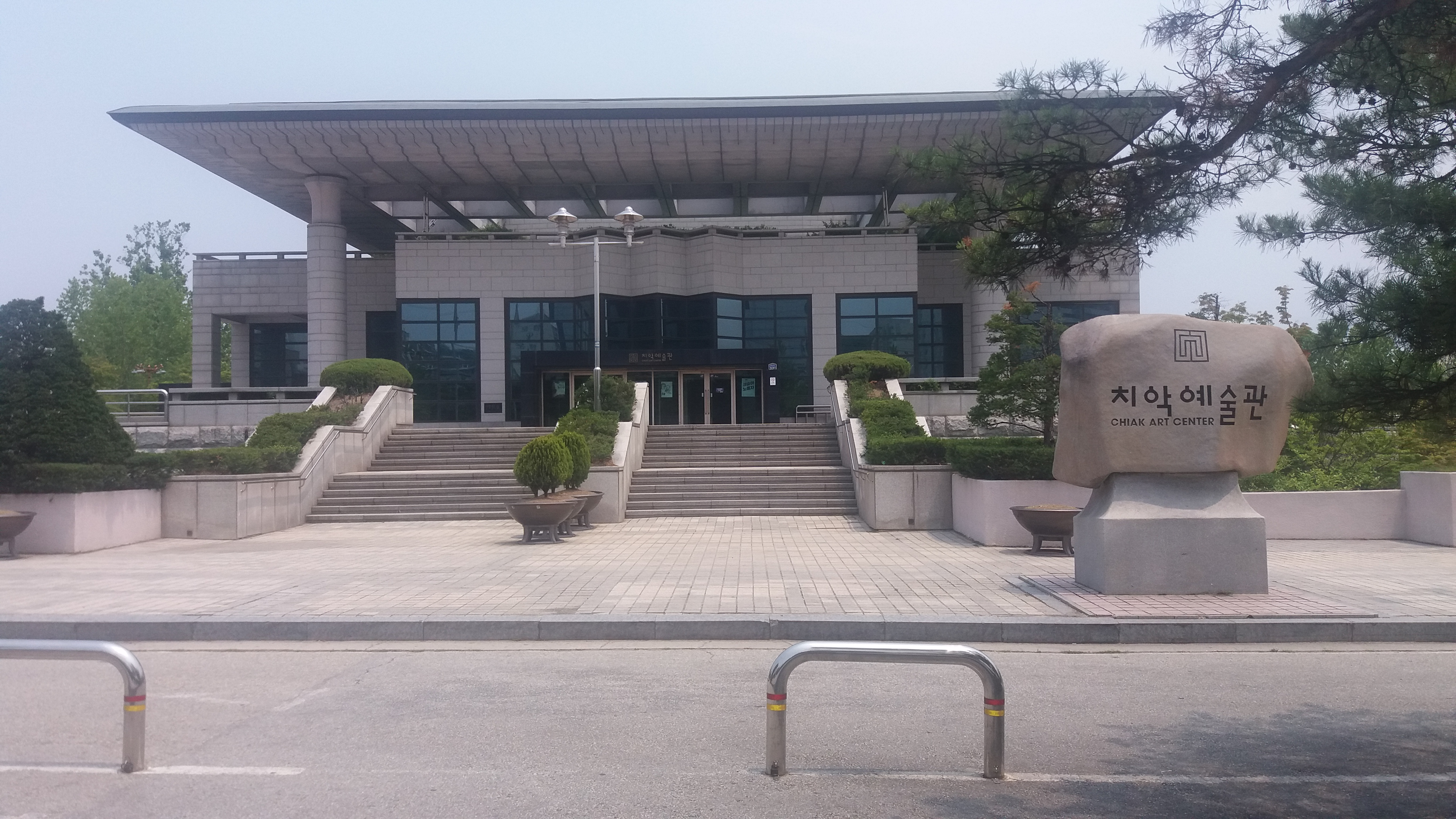 치악예술관